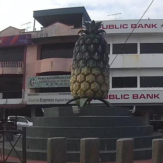 Pekan Nanas Pineapple statue